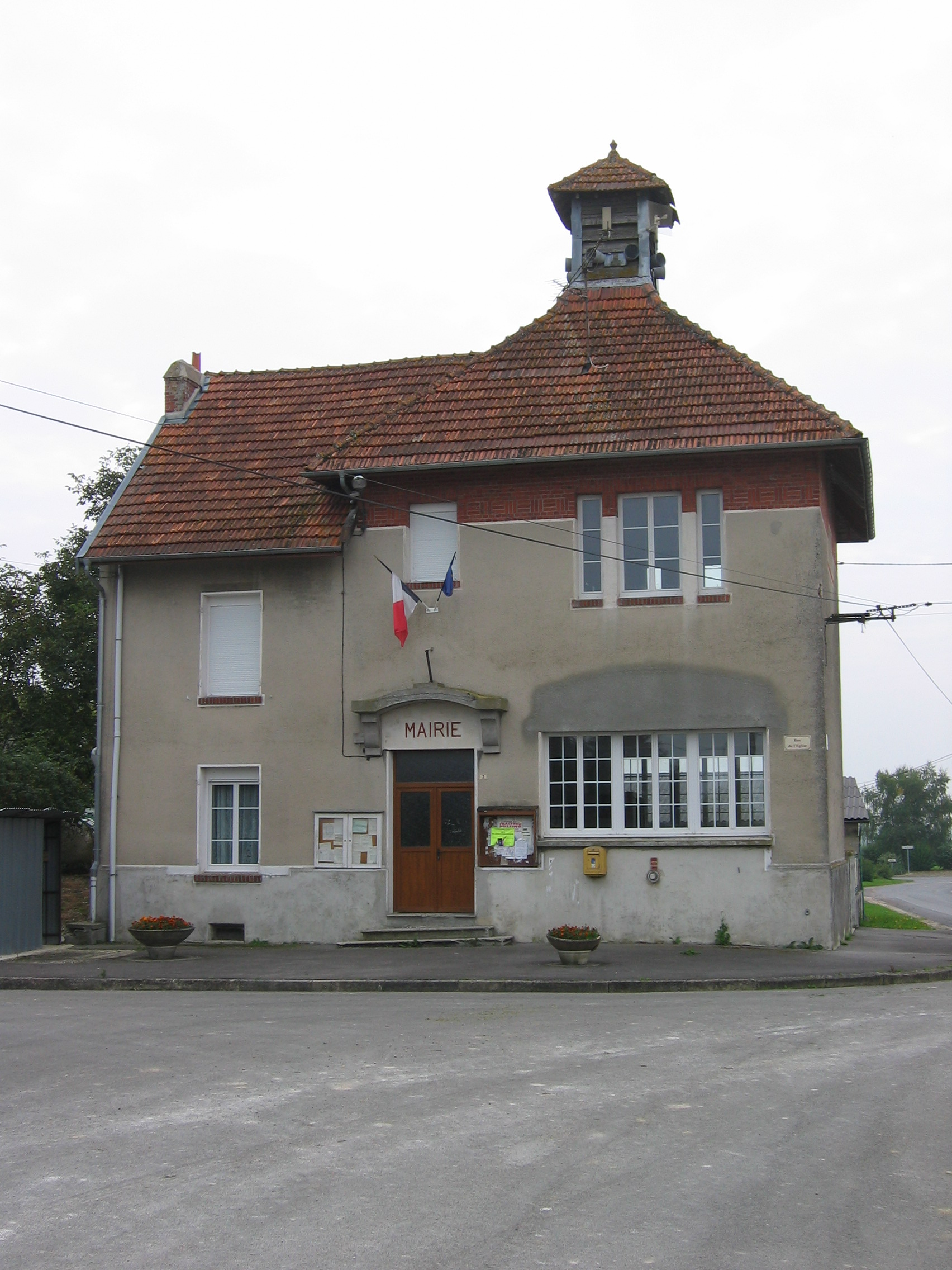 Mairie de Bouconville, Ardennes, France